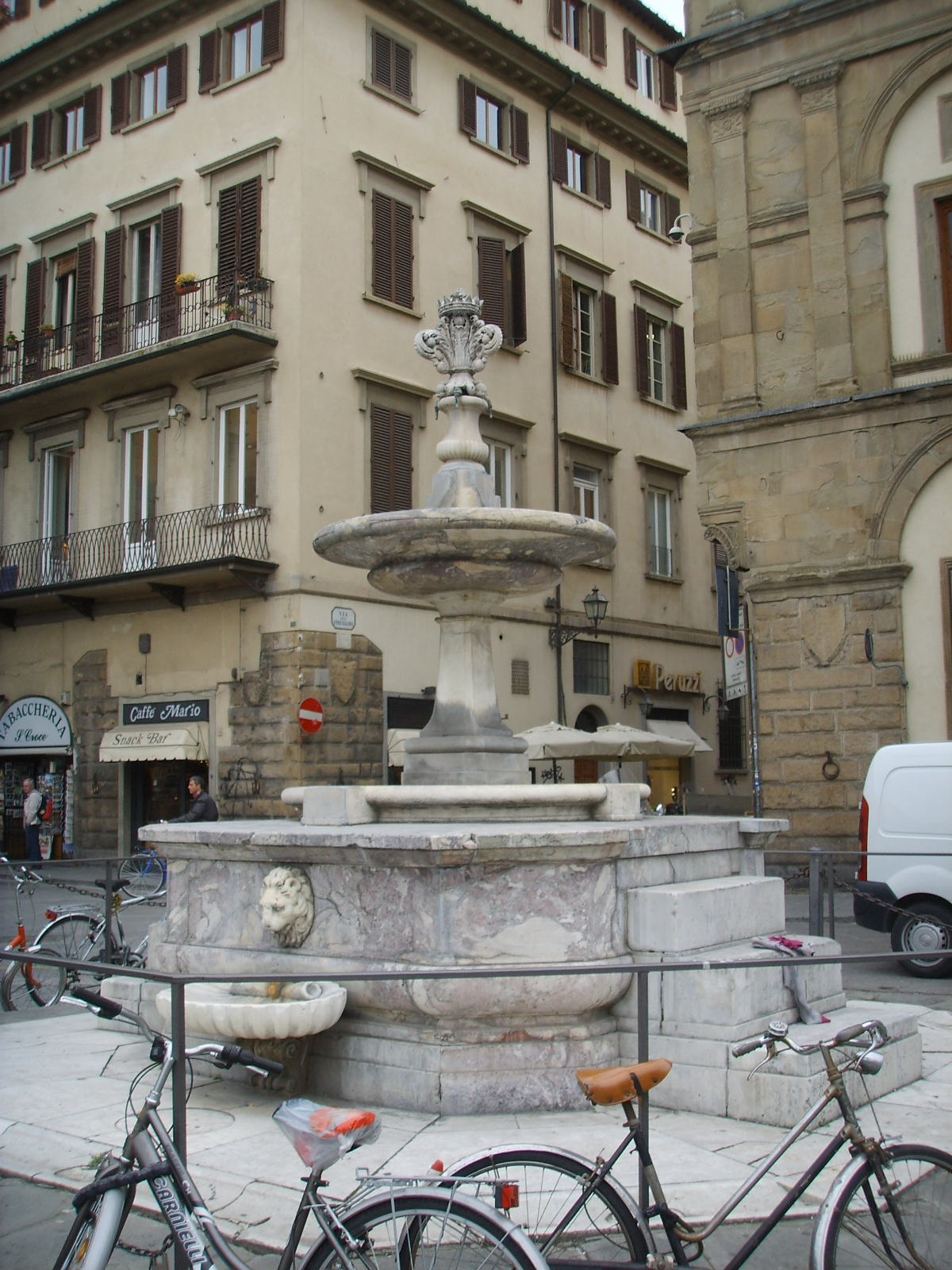 Fontana di piazza santa croce